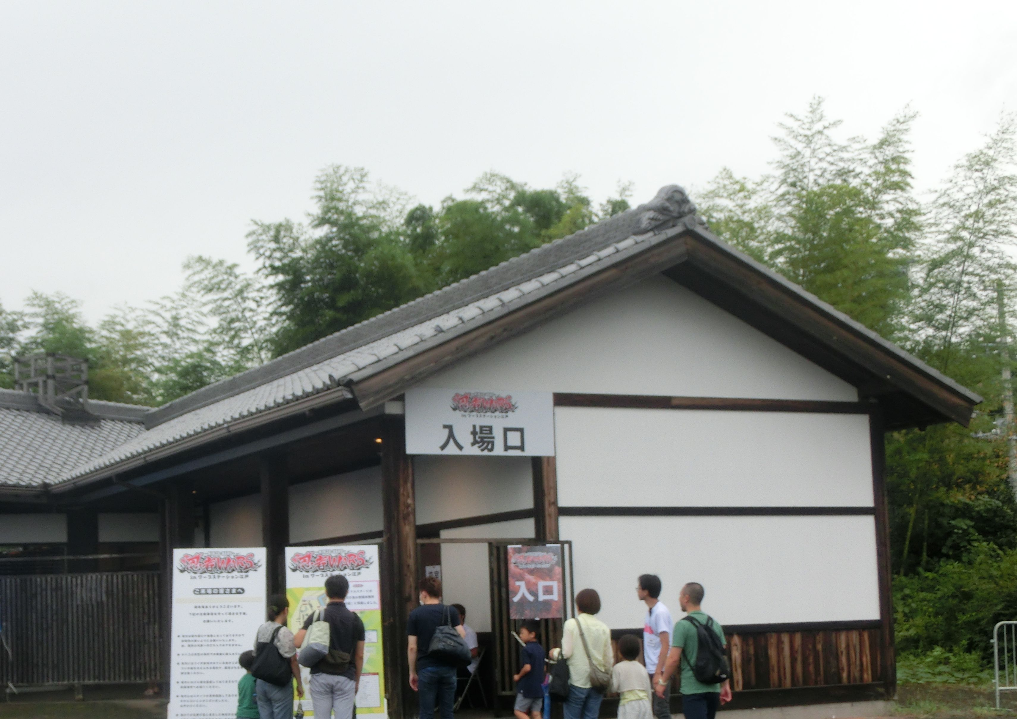 ninjawars